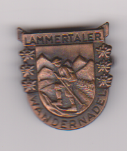 Österreich (A) - Land Salzburg (S) - Lammertal: Wandernadel (Bronze, 1979)